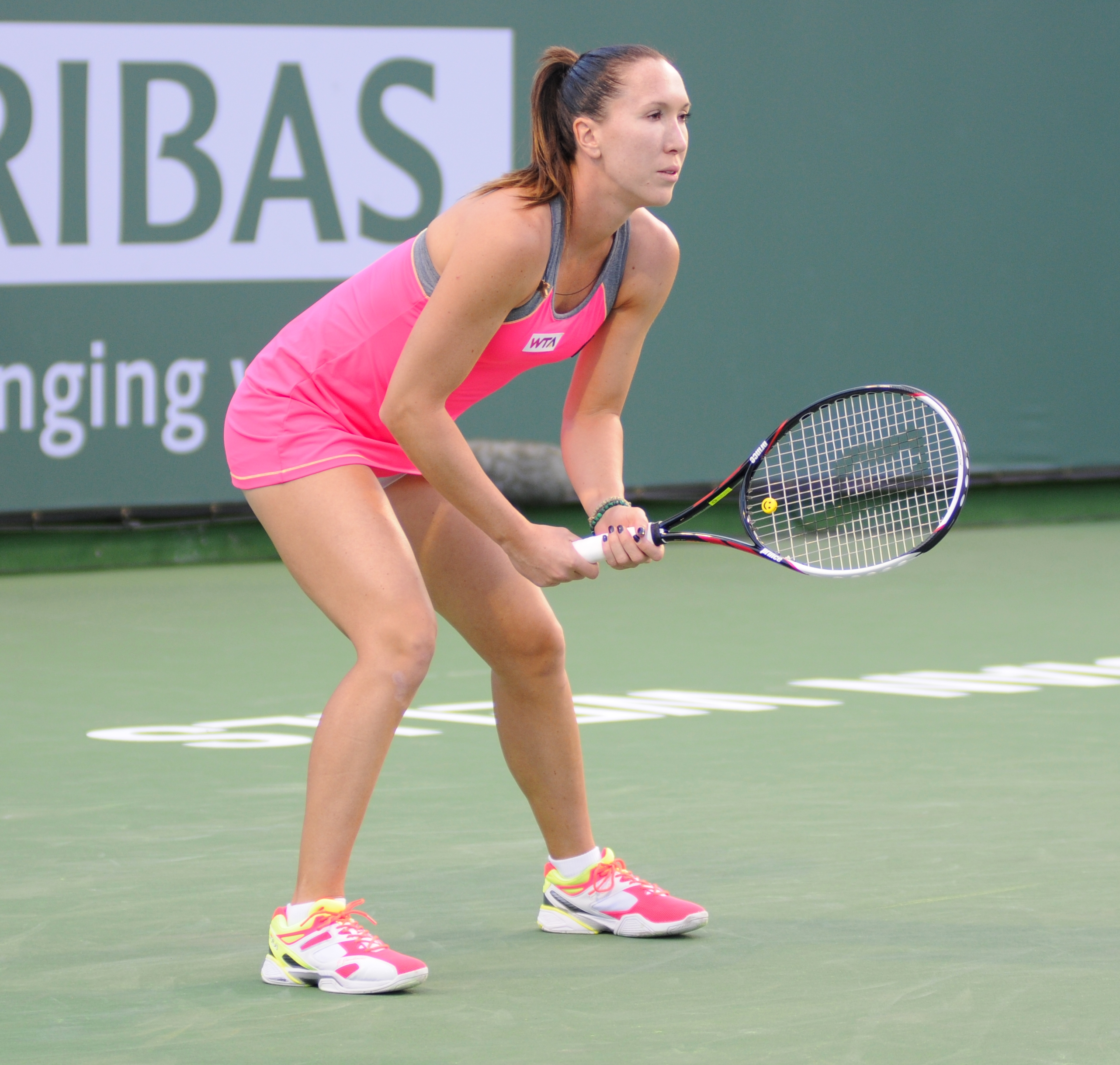 2014 BNP Paribas Open